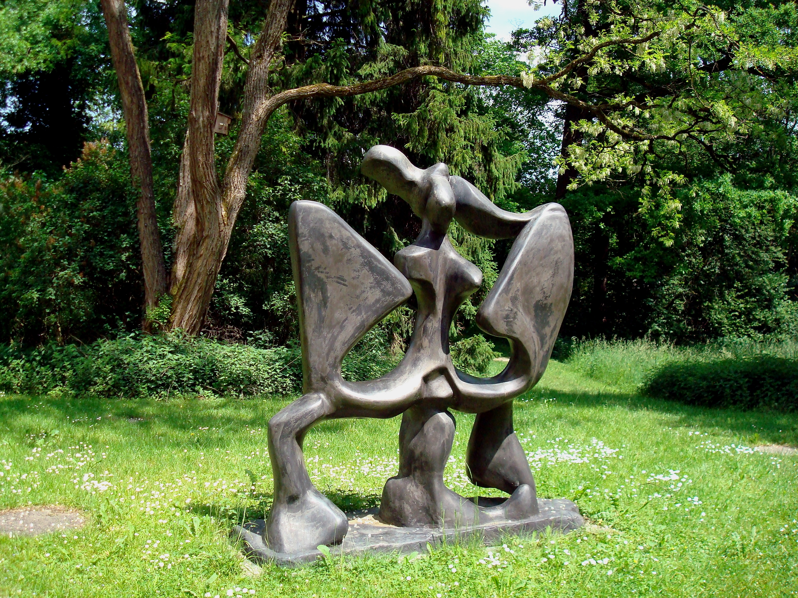 Gauting, Schloss Fußberg, Schlosspark. Bronzeskulptur "Der Engel von Troyes", eine Leihgabe des lange Zeit in Gauting lebenden Bildhauers Georg von Kováts.